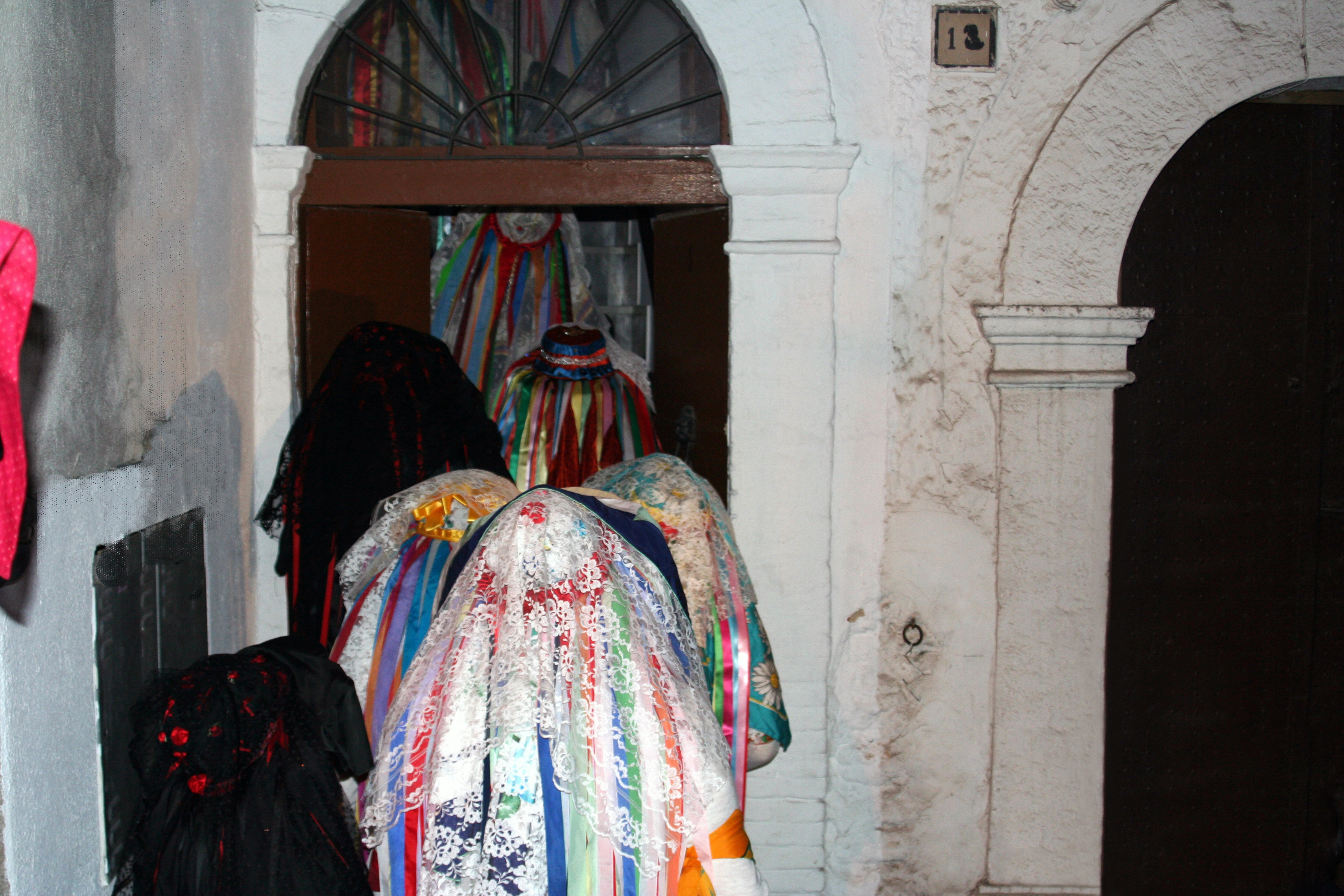 la mandria in questua entra in una casa dopo essersi annunciata con il fragore dei campanacci.